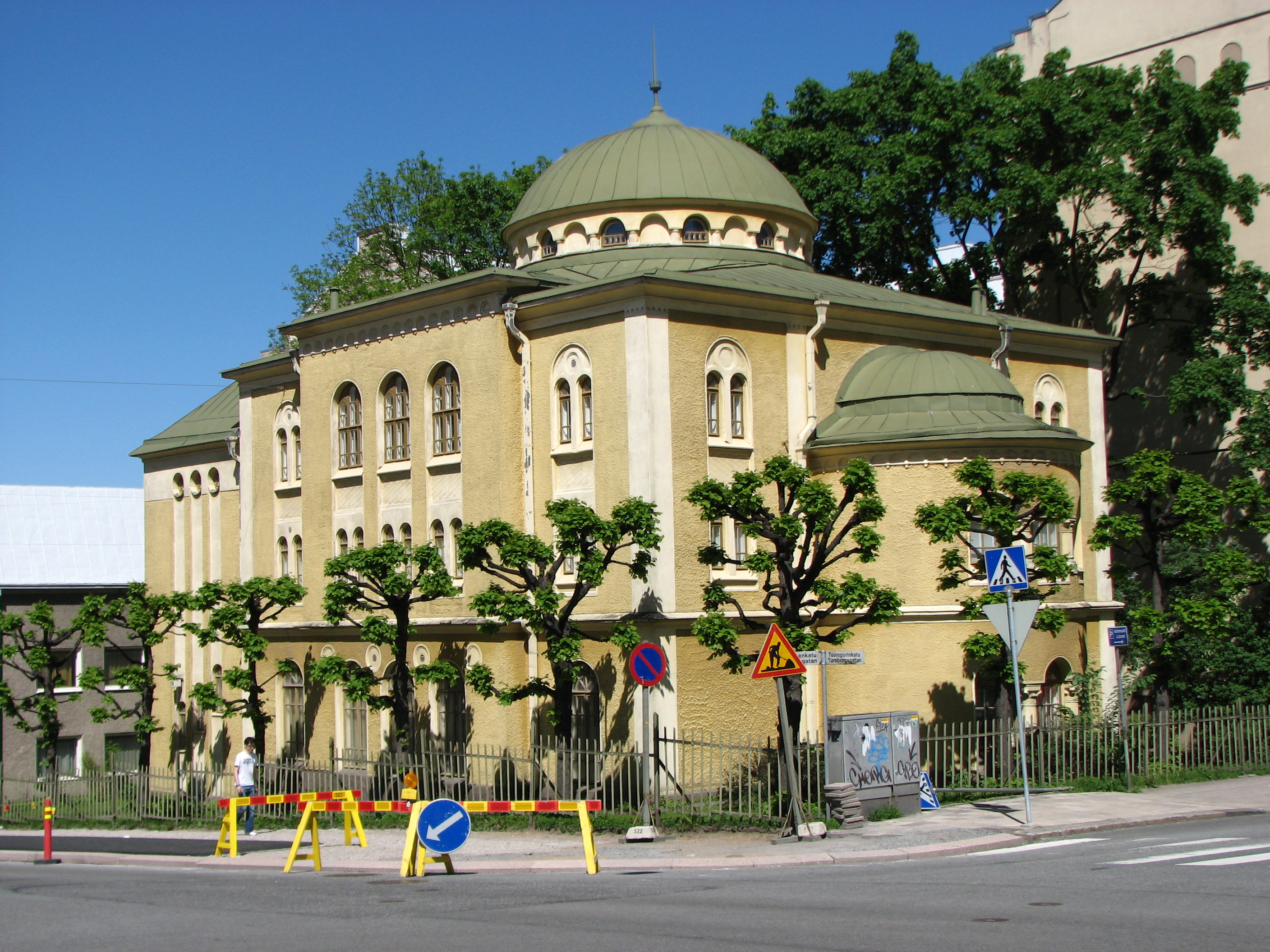 Turku Jewish Synagogue in Turku, Finland